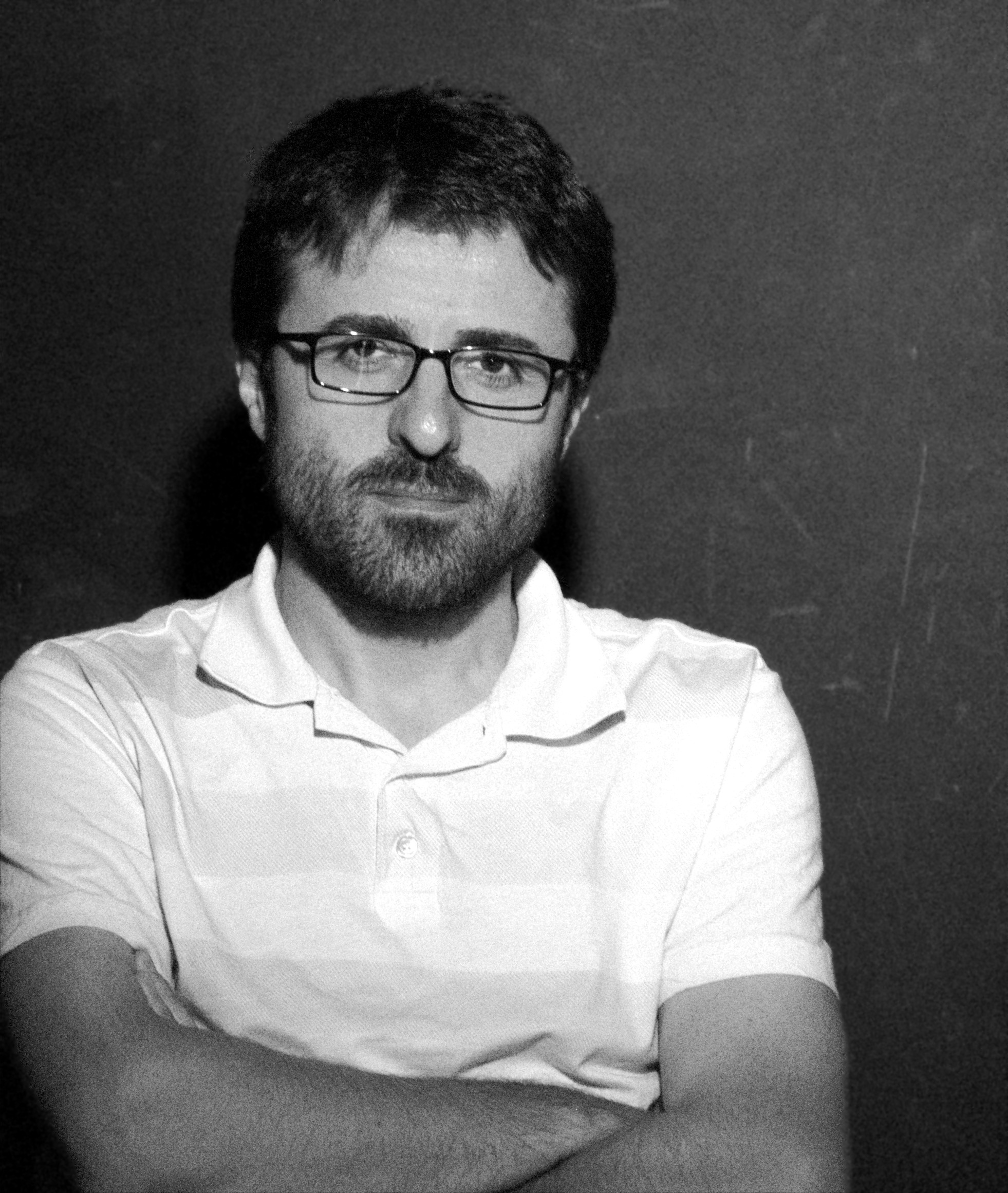 Aufgenommen anlässlich eines Vortrages im Rahmen der IGLFA European Cup 2015 in den Fanräumen im Millerntor-Stadion.